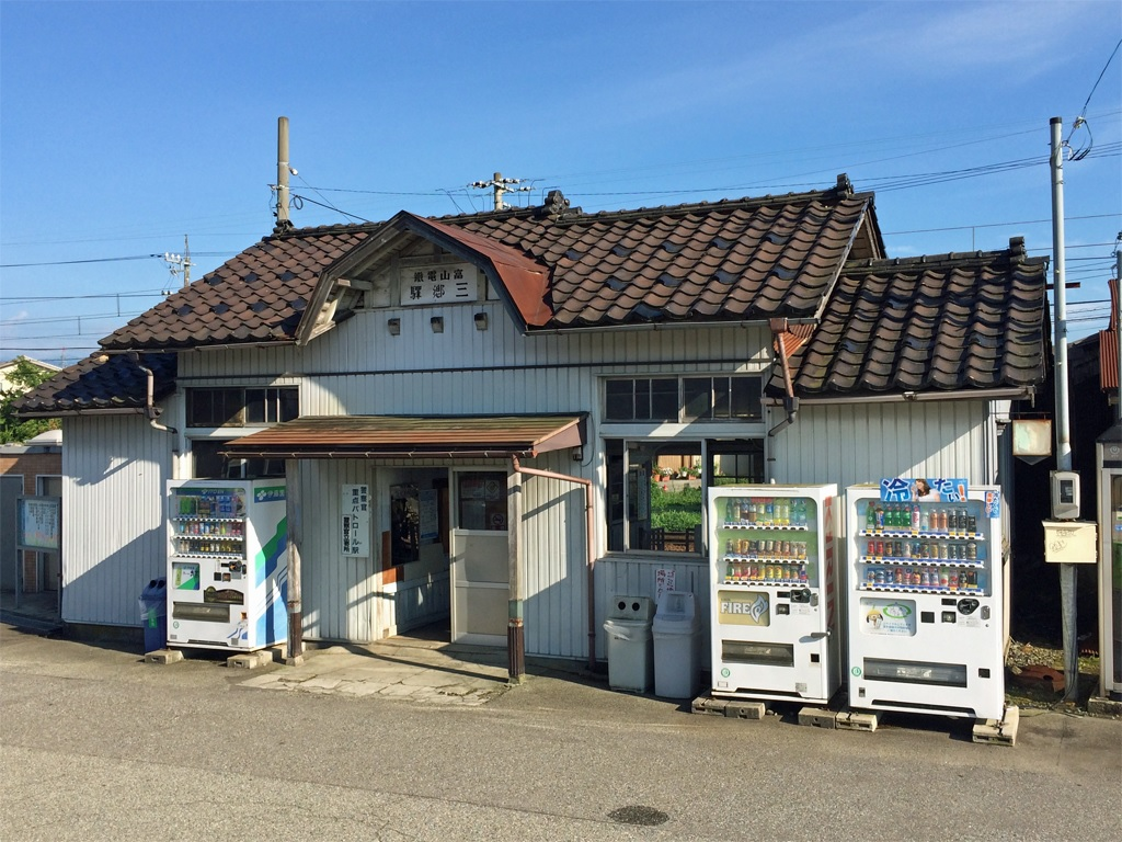 富山地方鉄道本線 越中三郷駅 駅舎